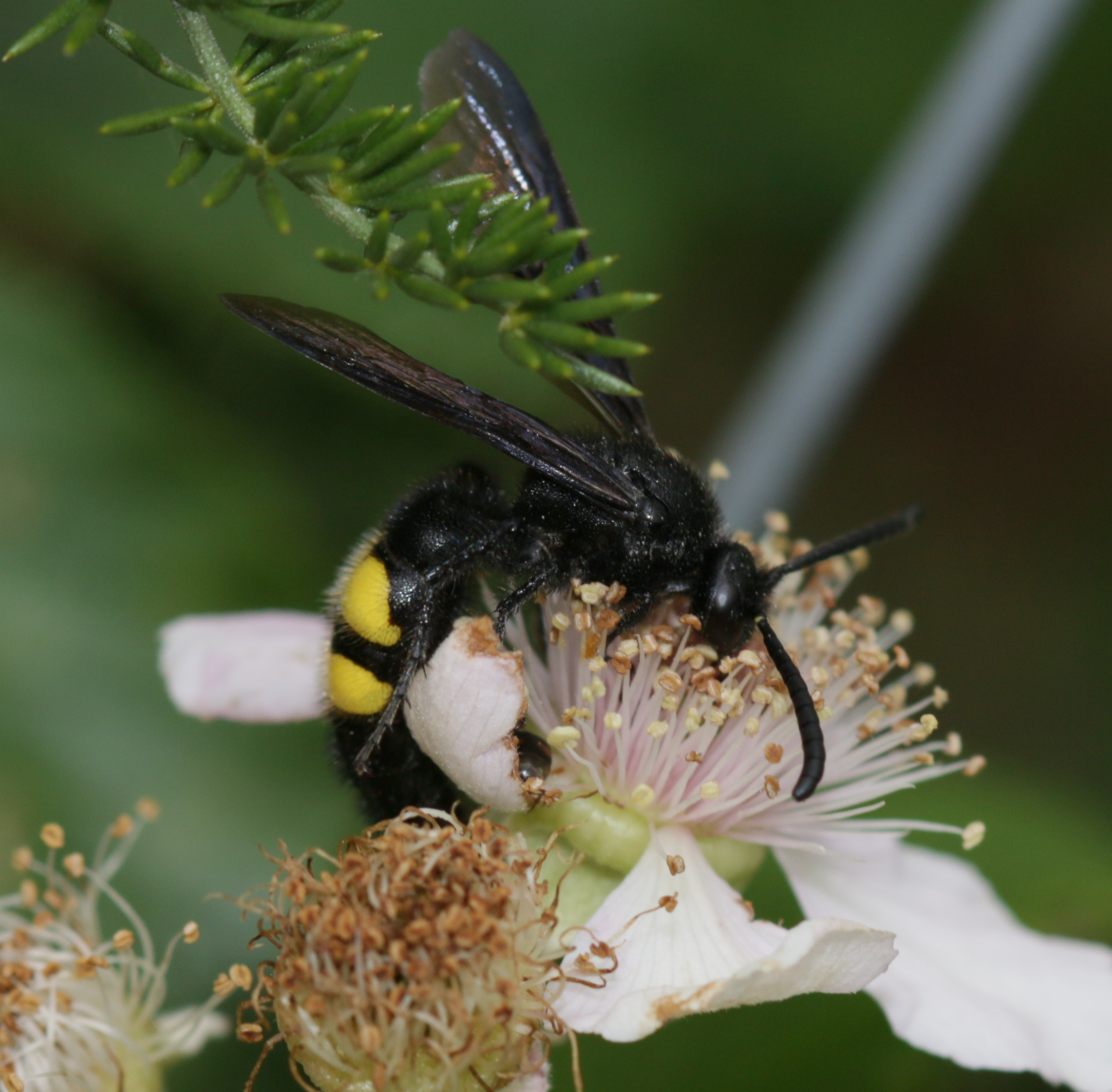 La Franqueta, Parc Natural Els Ports, Catalunya